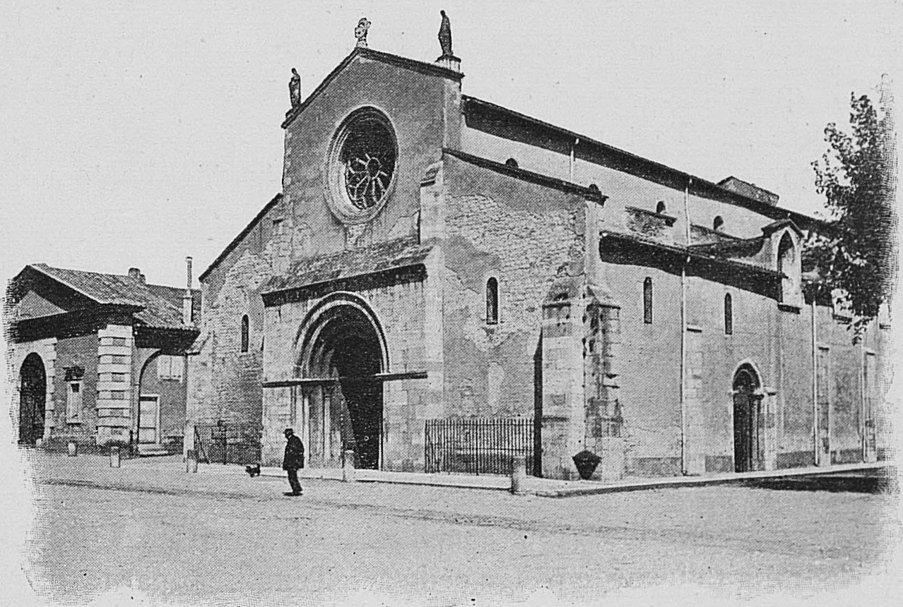 Dictionnaire illustré des communes du département du Rhône. Tome 1 / par MM. E. de Rolland et D. Clouzet.